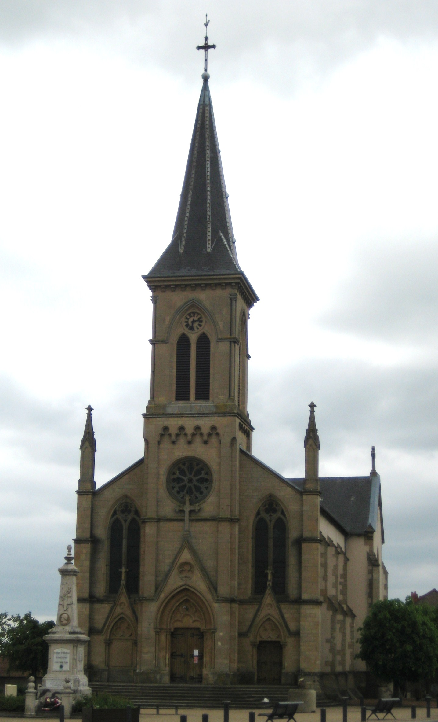 Description Église Audun le RomanDate 16 May 2009Source mon appareil photoAuthor Aimelaime Église Audun le Roman